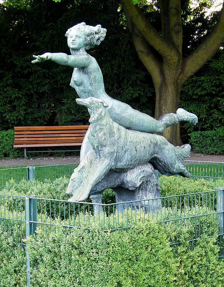 Walter Schott: Jagende Nymphe. 1926, Bronze. Rosengarten im Humboldthain, Berlin-Gesundbrunnen.